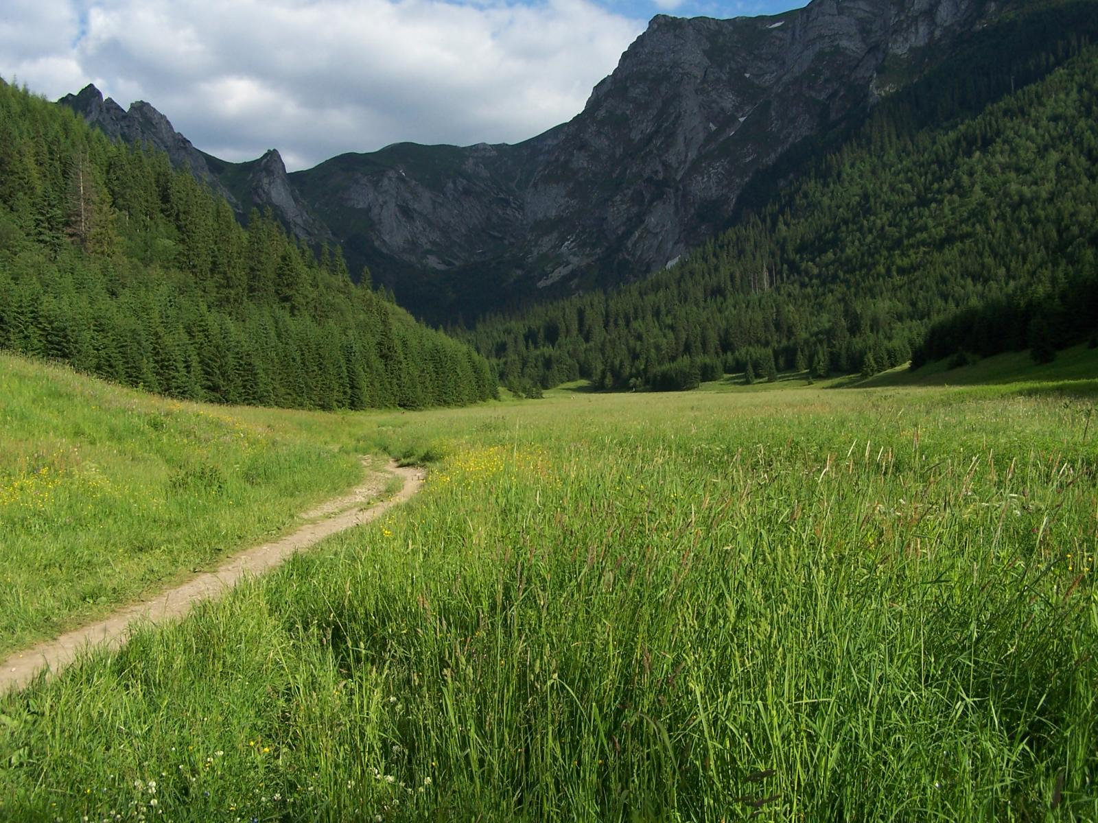 Dolina Małej Łąki (Tatra Mountains)